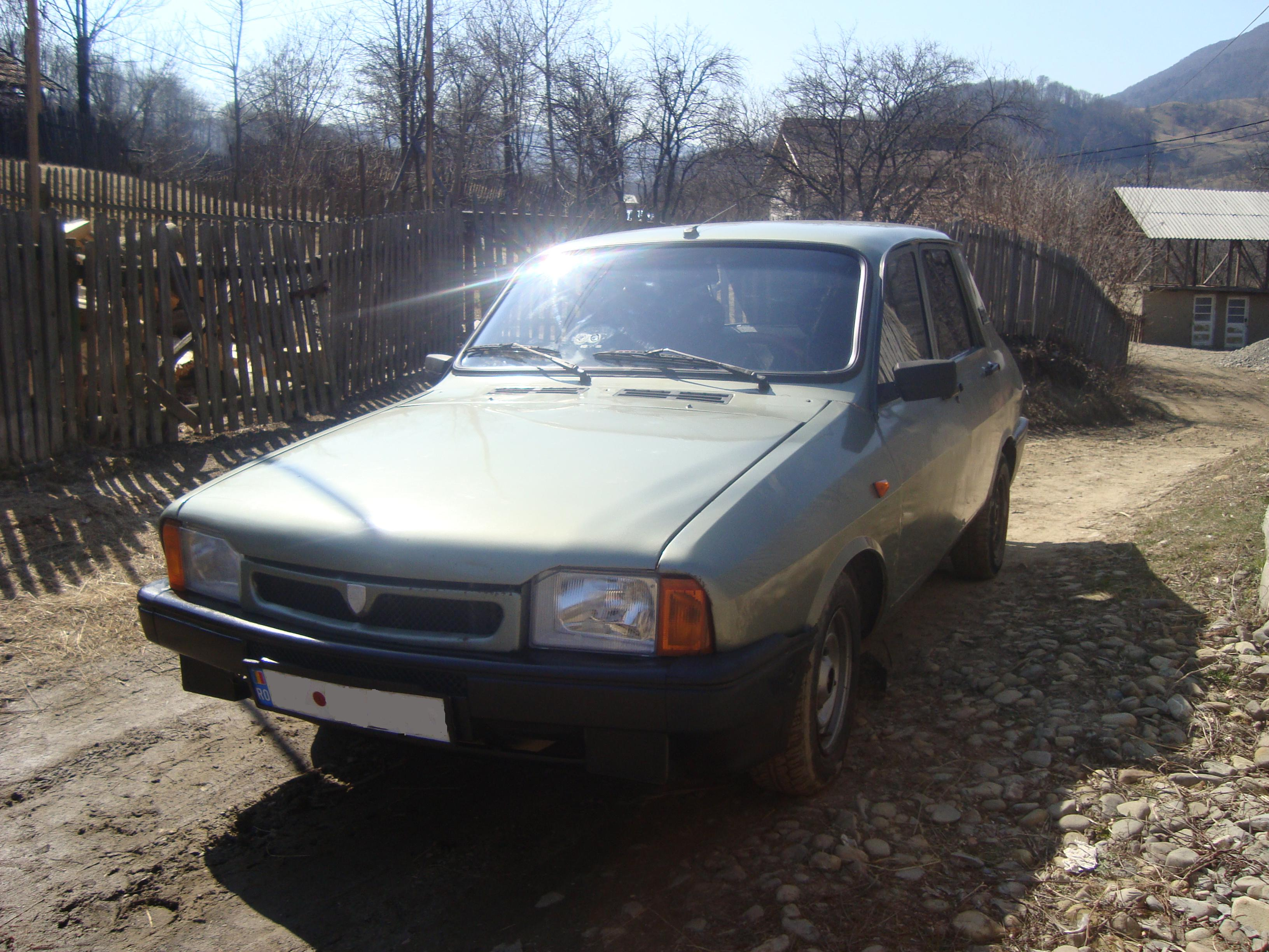 O fotografie ce reprezinta Dacia 1310 din anul 1996.